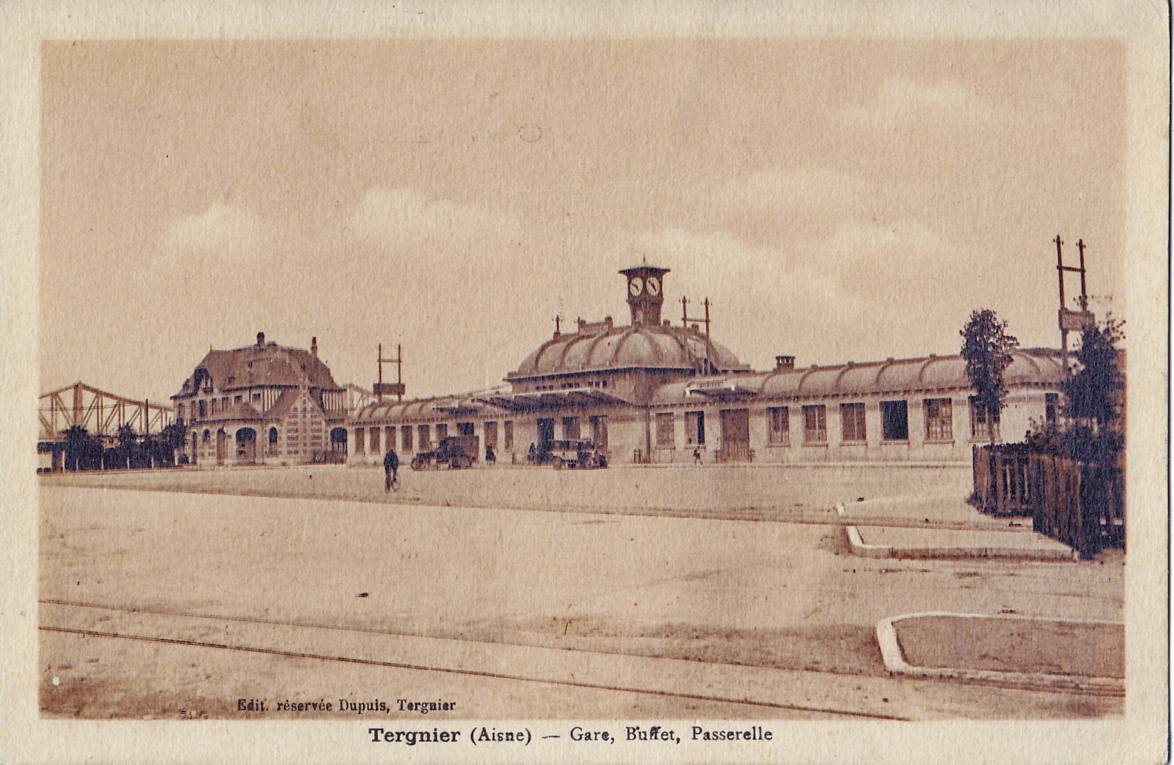 Carte postale ancienne éditée par Dupuis à Tergnier : TERGNIER - Gare, Buffet, Passerelle